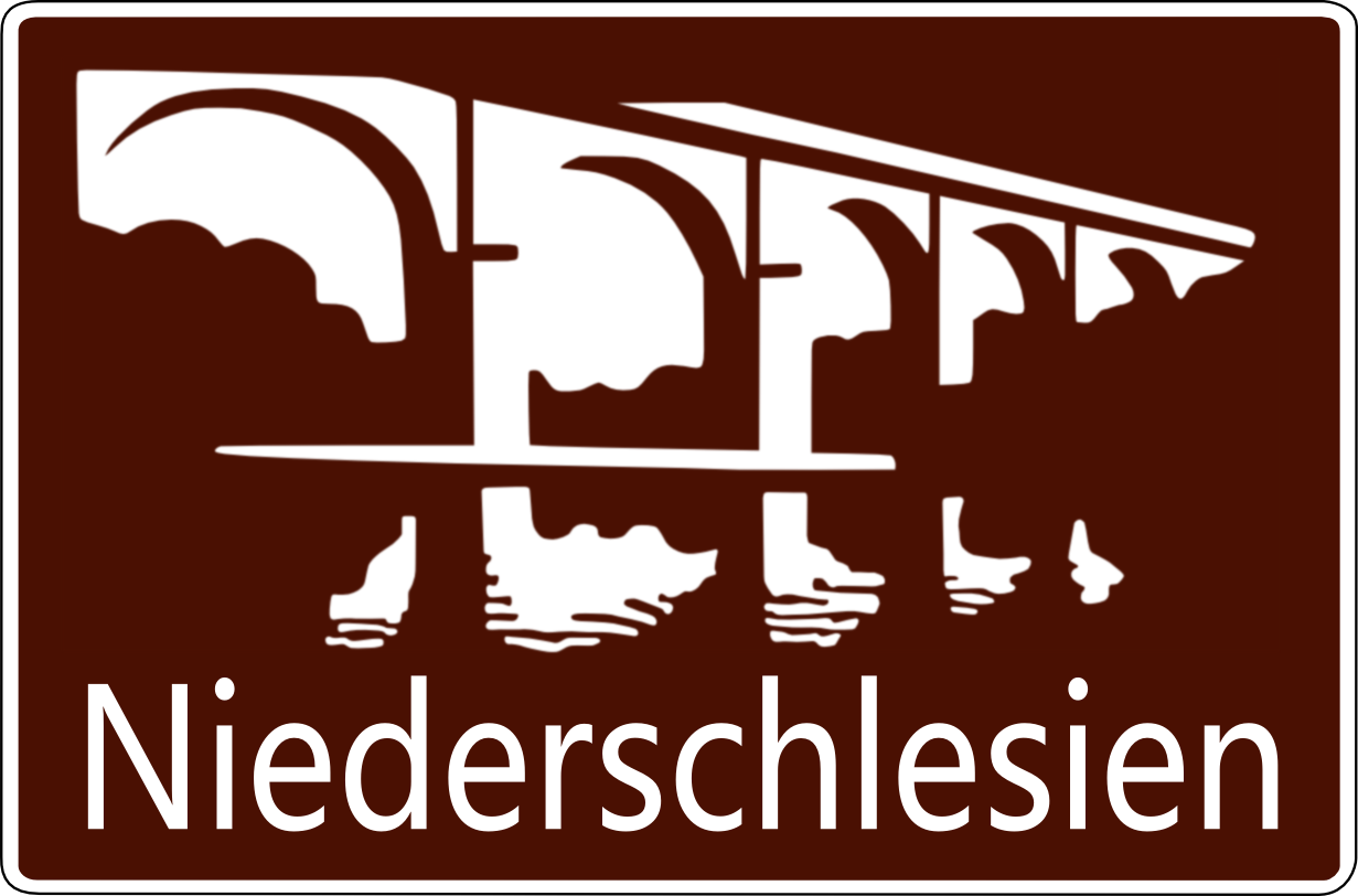 Unterrichtungstafel an der A 4 - Hinweis auf Niederschlesien